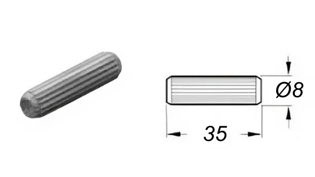 Шкант деревянный диаметром 8 мм и длиной 35 мм